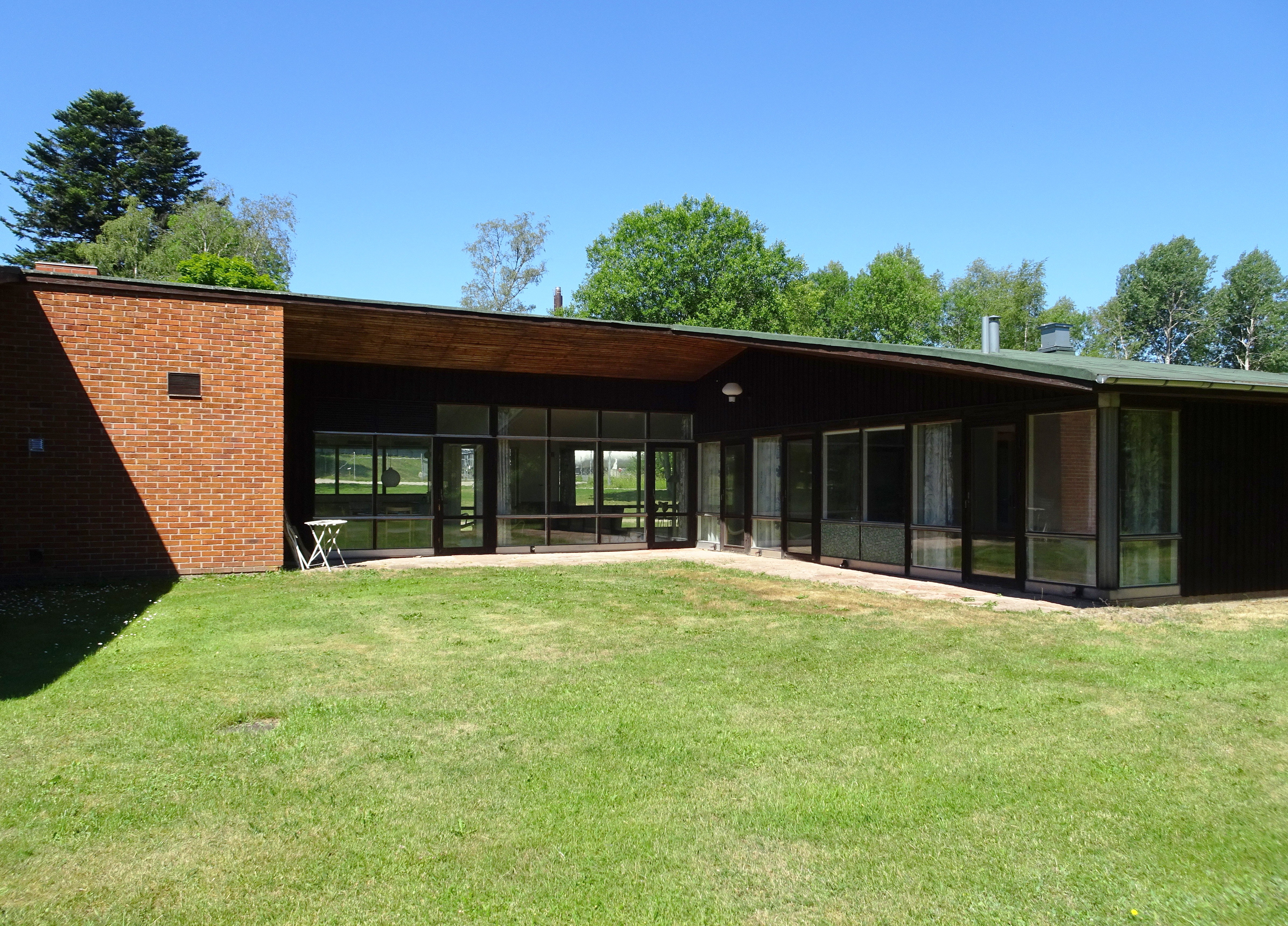 Kosta glashus arkitekt Bruno Mathsson